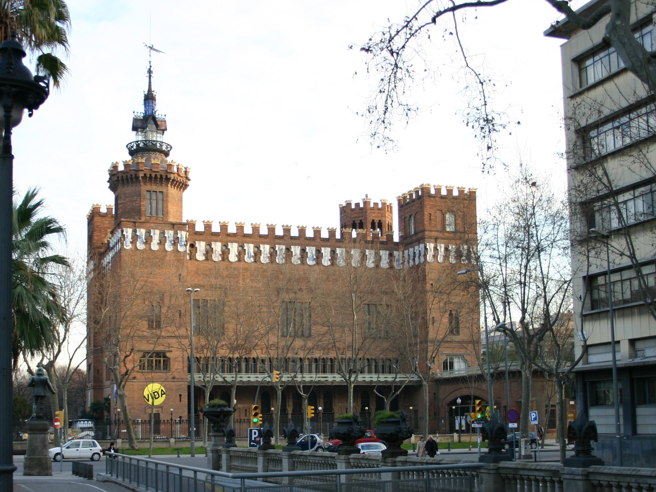 Castle of the Three Dragons (Ciutadella) Barcelona